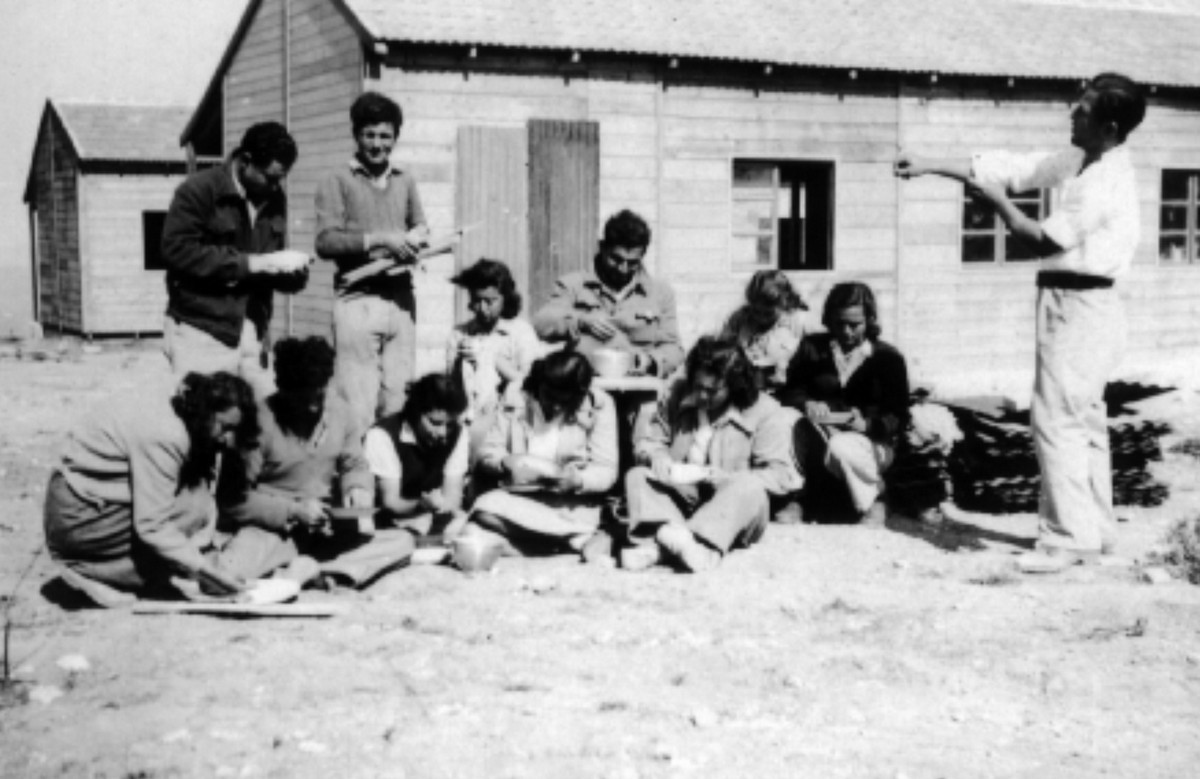 חטיבת הראל - הגדוד השישי - 2 - גוש עציון - קיבוץ השומר הצעיר רבדים - ברור אורז לארוחת צהרים לארוחת הצהריים. ברוך במבגי', אוריאלה, נעמי ש', חנוך ז', רחל ע', אליהו הסמן, שרגא, בלנה, אלישבע, שולה, ג'קי, חולה.